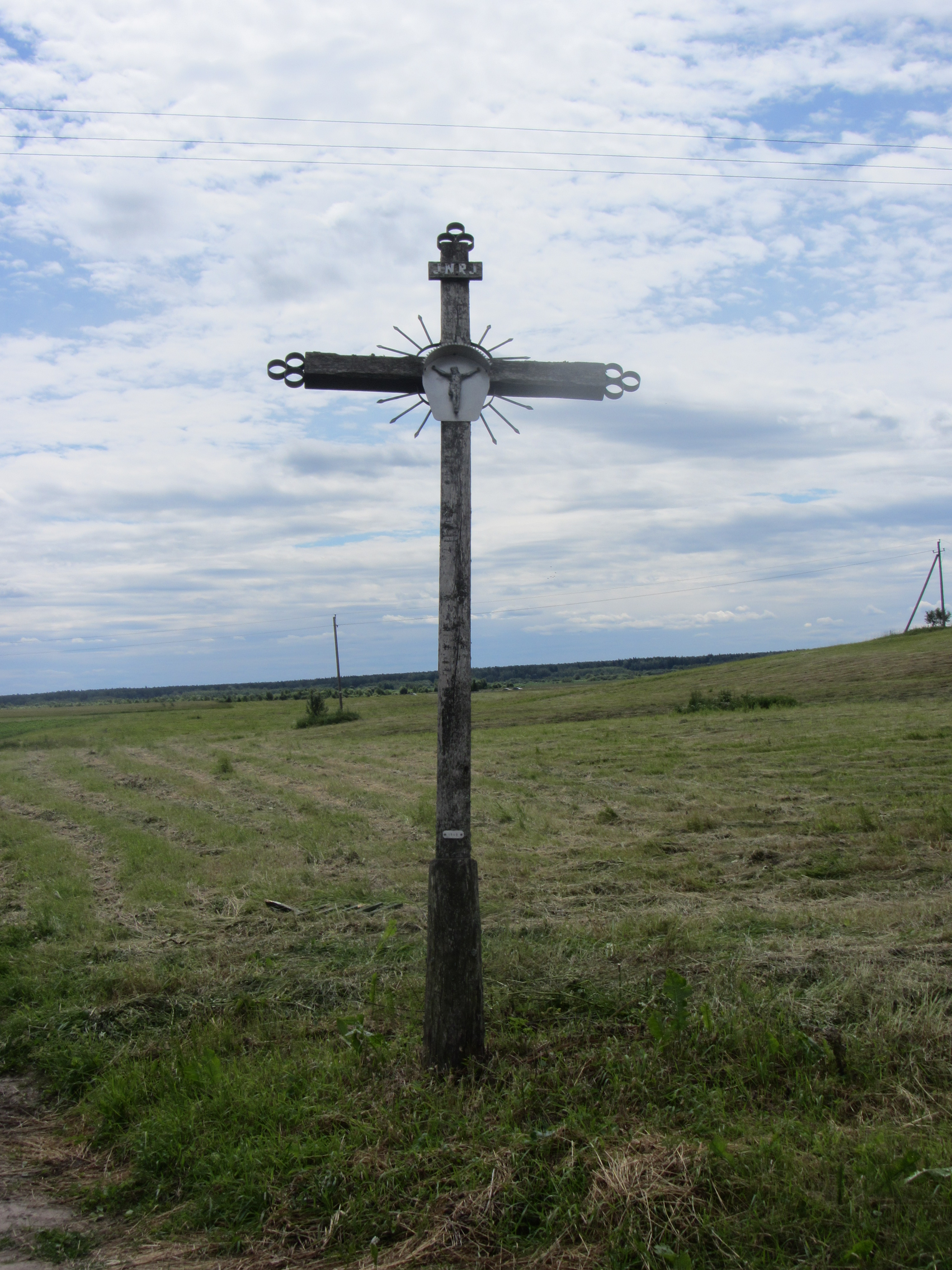 Jauniūnų sen., Lithuania